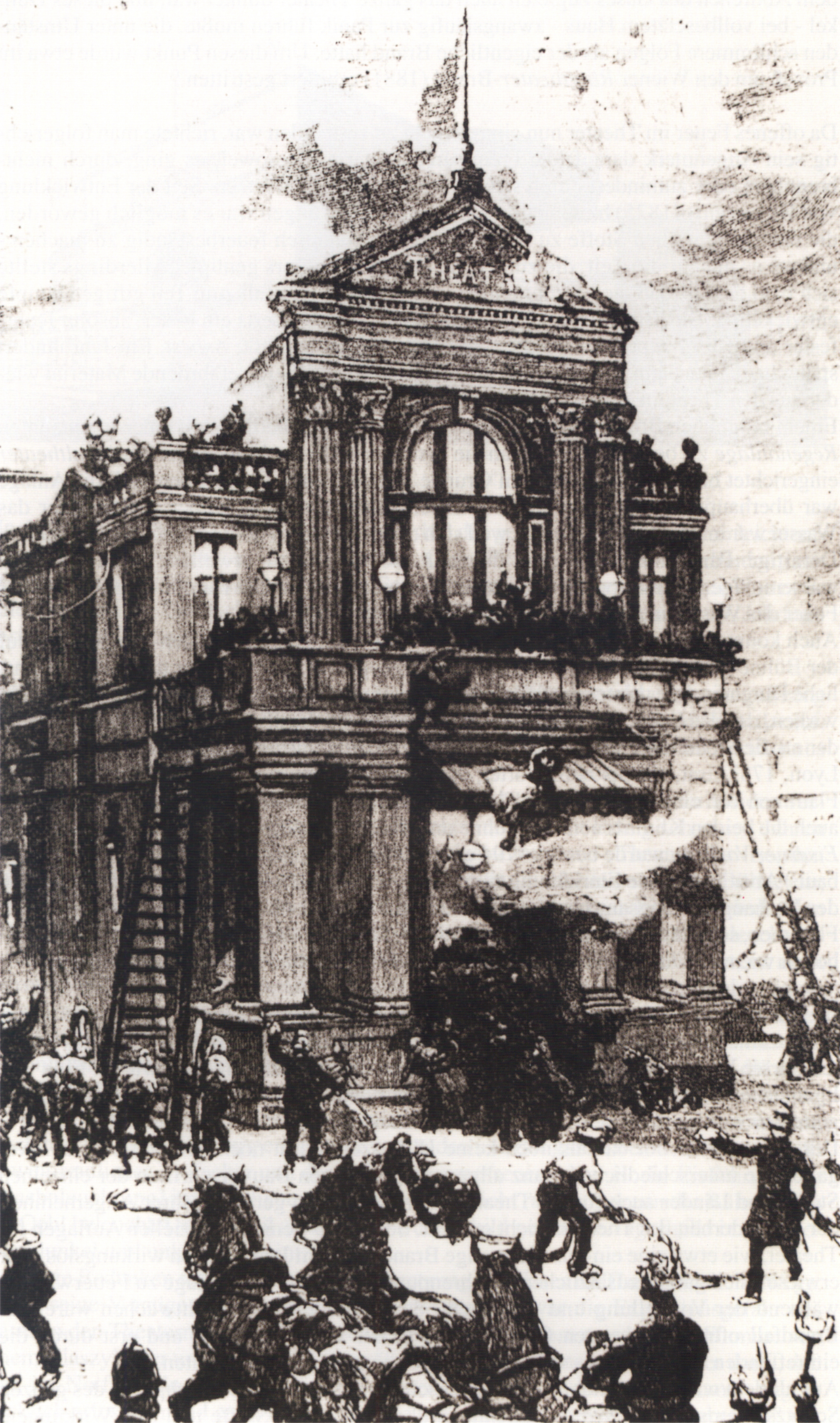 Brand des Theatre Royal in Exeter am 5. September 1887, anonymer Zeitungsdruck, ohne Jahr